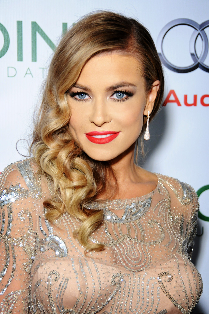 Carmen Electra, Los Angeles, California, September 2013